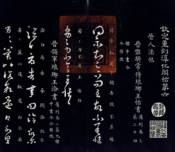 淳化阁帖第六 晋人法帖（王恬、王洽/书法）